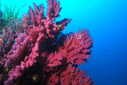 Gorgones rouges